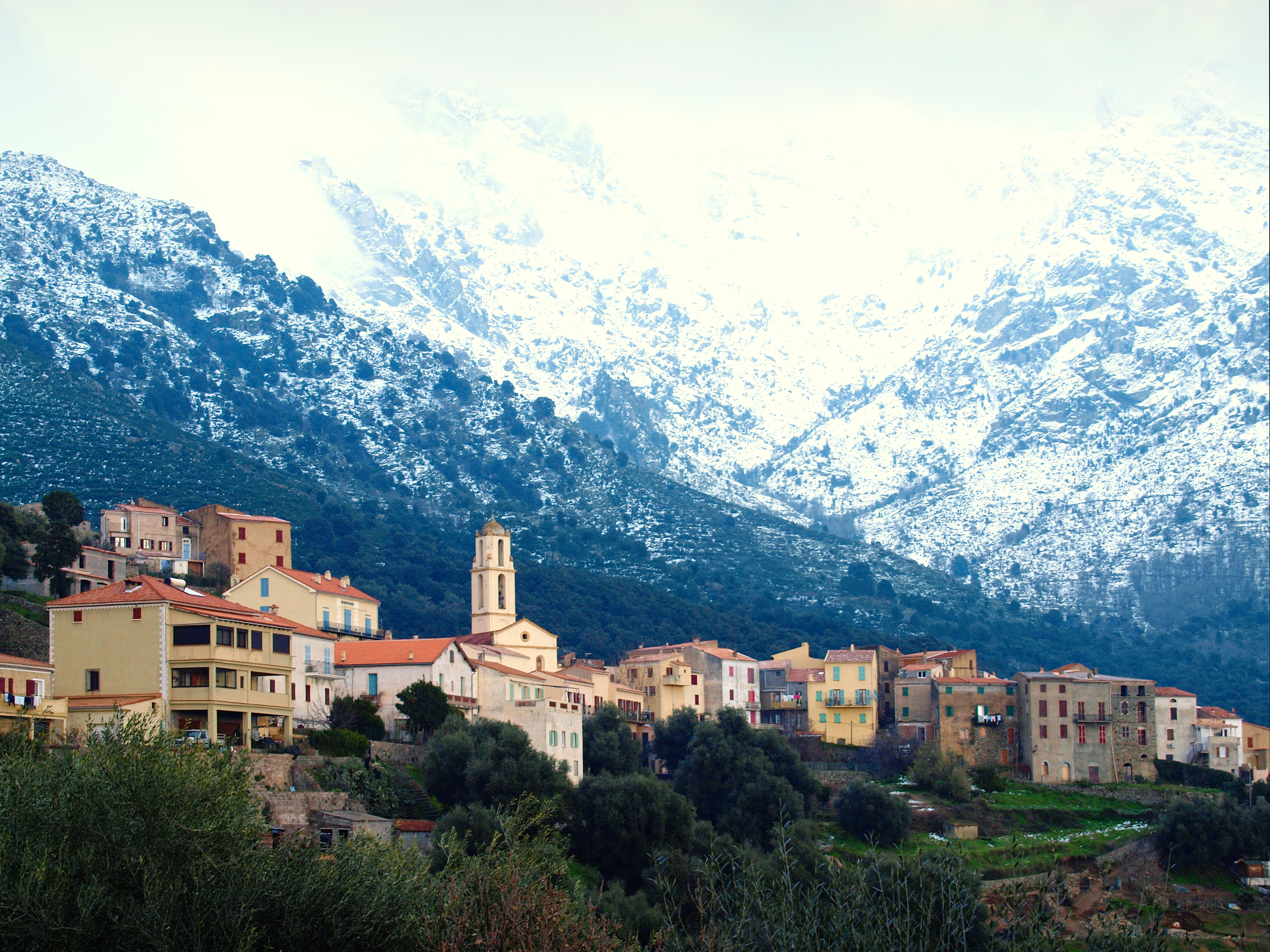 Ziglia, Balagne (Corse) - Vue du village au pied du Monte Grosso